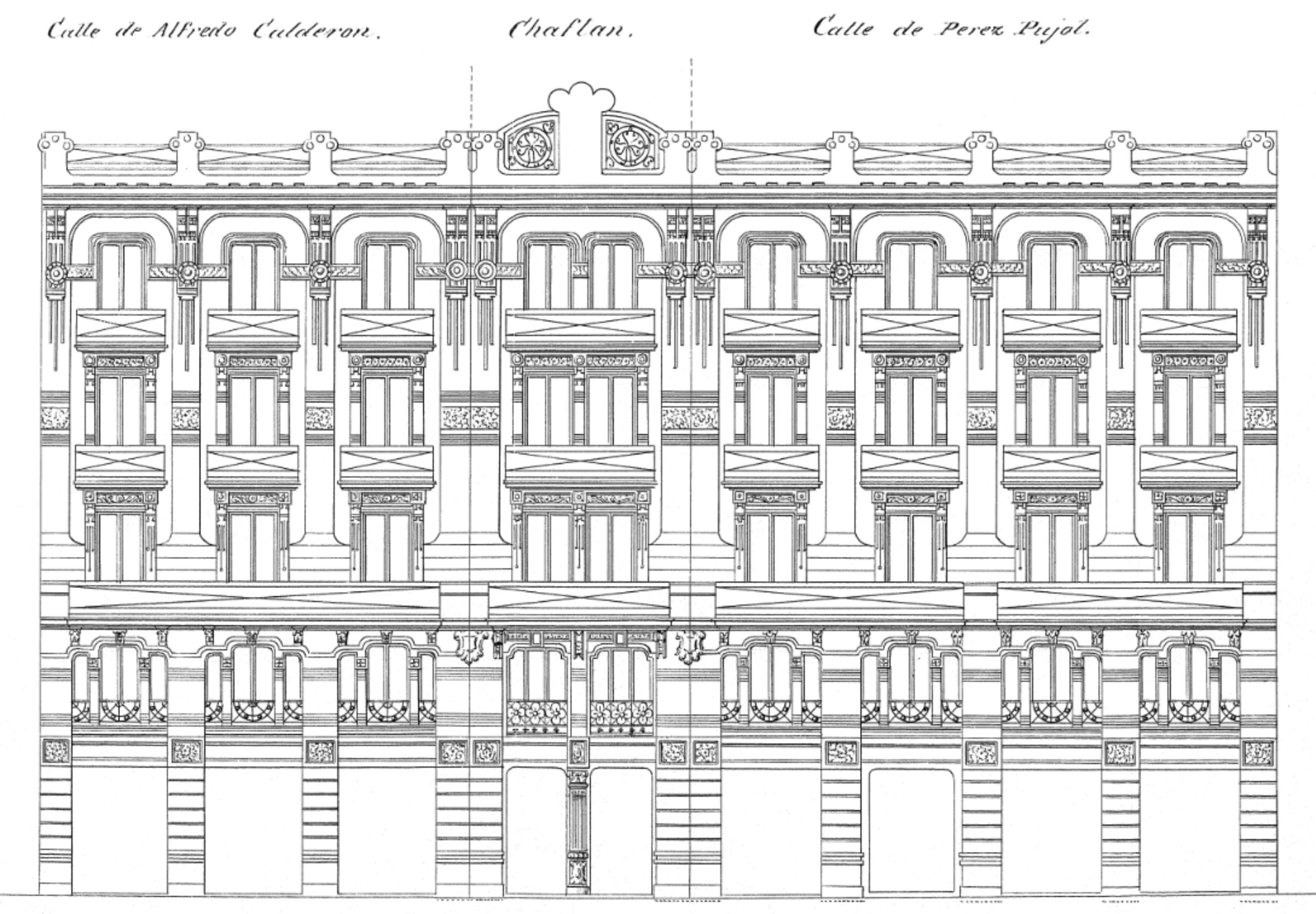 Plano de la Casa Boldún, edificio modernista valenciano, 1914. Obra del arquitecto valenciano Antonio Martorell Trilles.